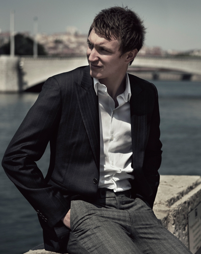 Kim Källström in Café Magazine .